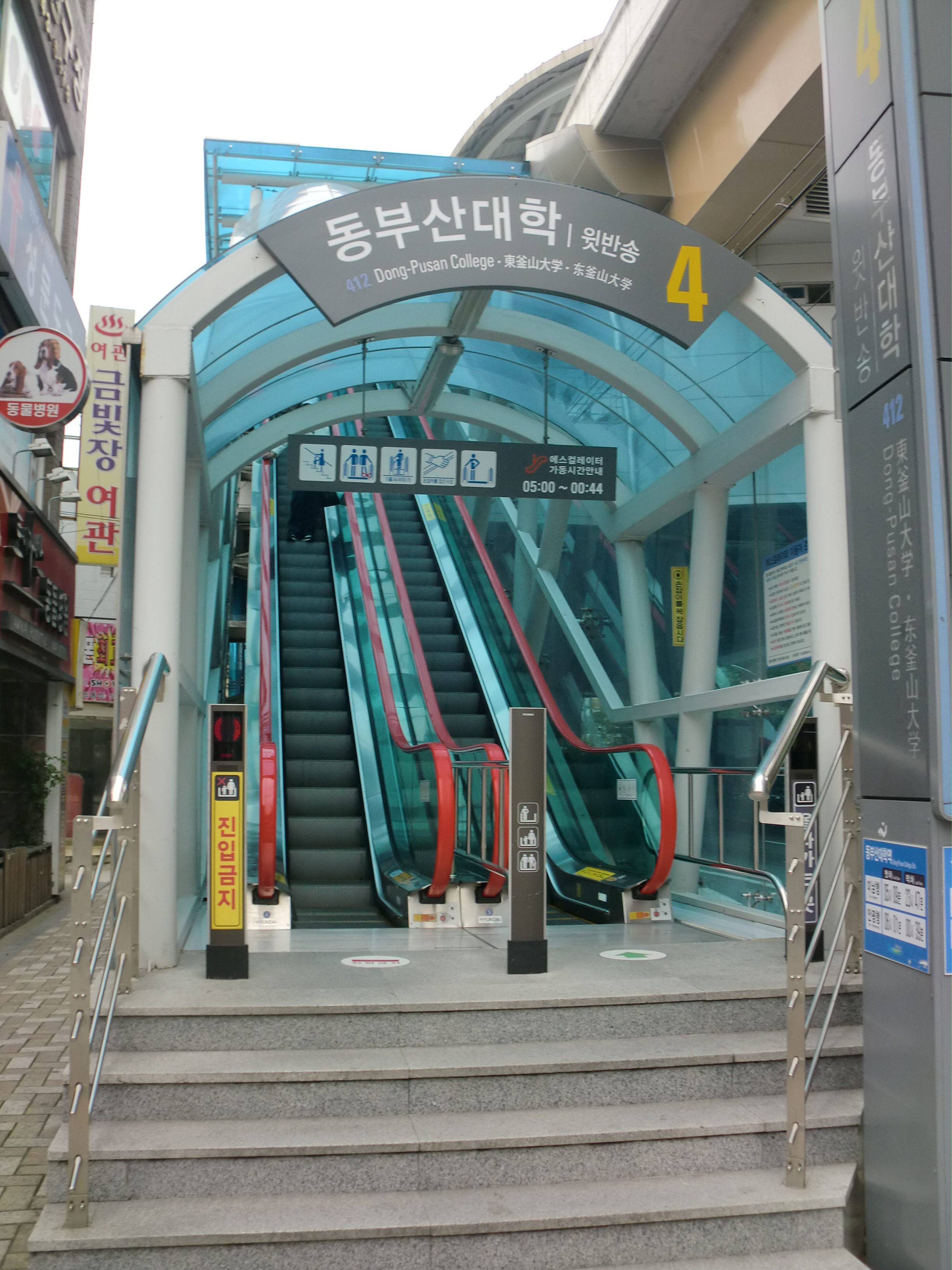 부산도시철도 4호선 동부산대학역 4번출구